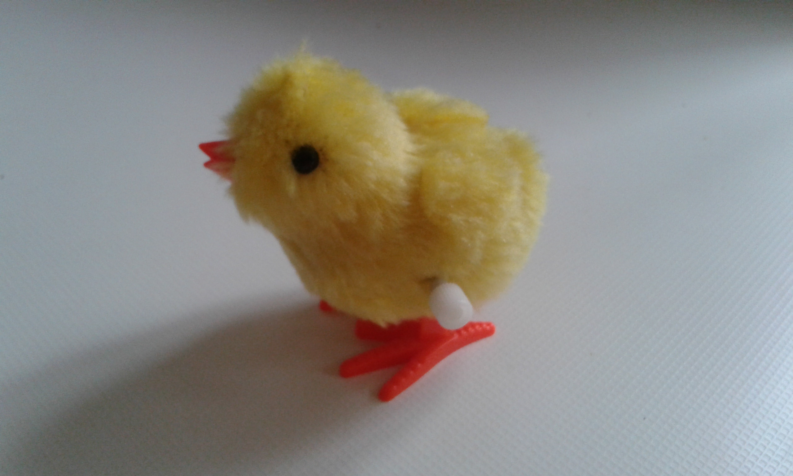 Fotografía de un pollito a cuerda.